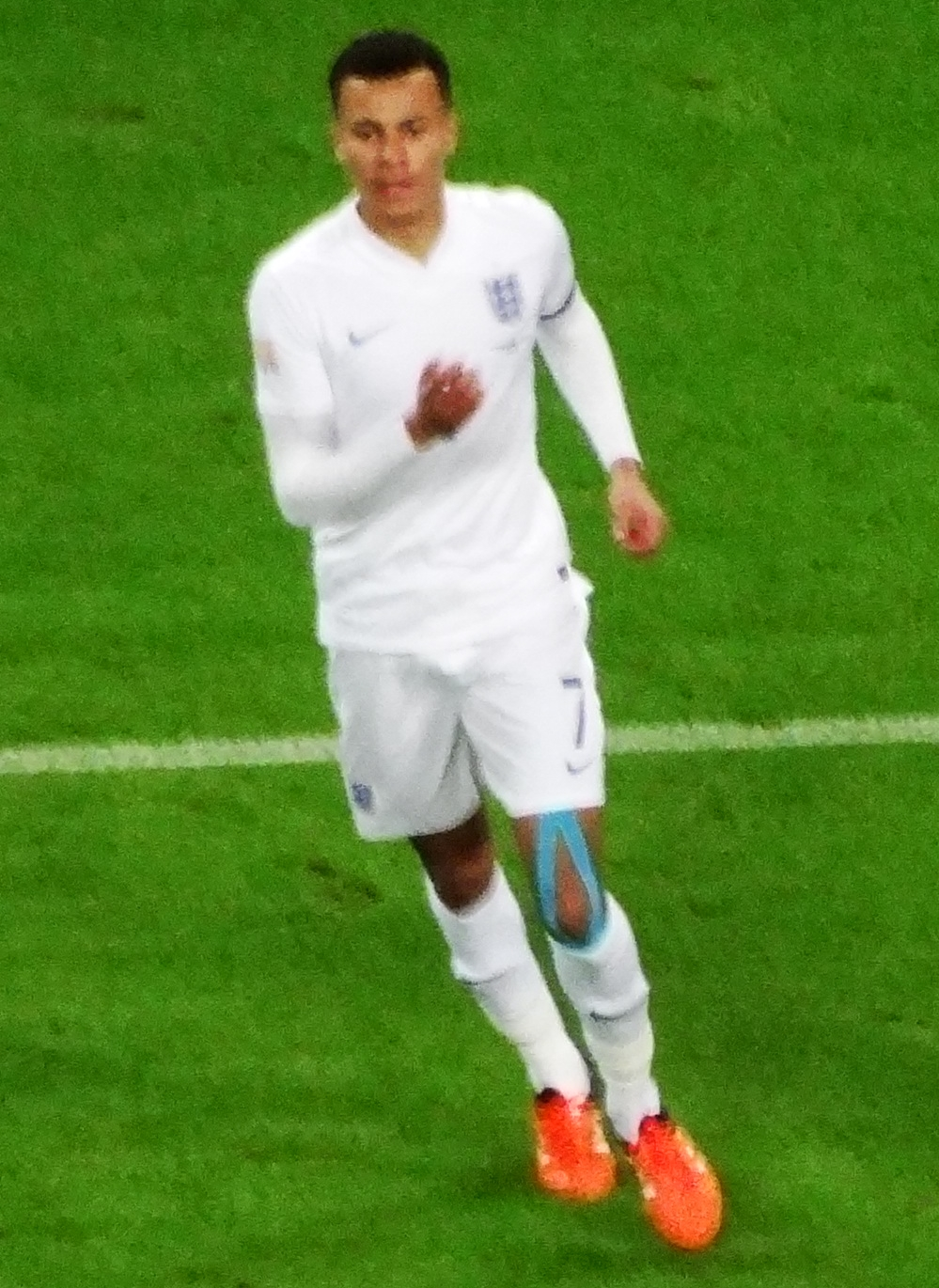 France midfielder Hatem ben Arfa races past England midfielder Dele Alli